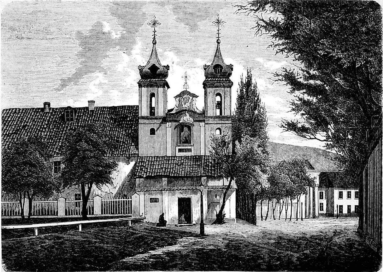 Беларуская (тарашкевіца): Вільня (Vilnia), вуліца Людвісарская (vulica Ludvisarskaja). Касьцёл і кляштар баніфратаў